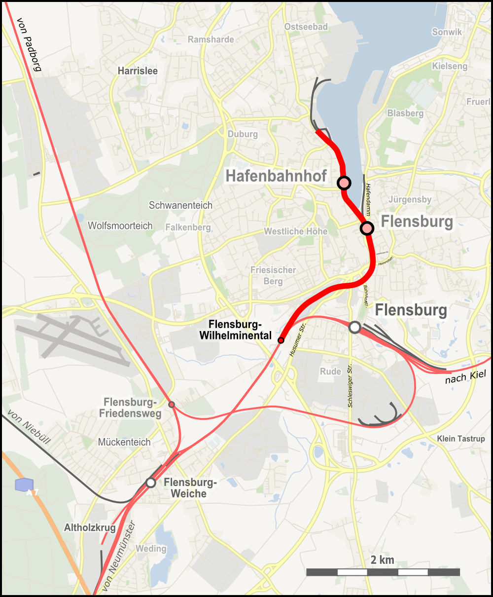 Karte der Flensburger Hafenbahn